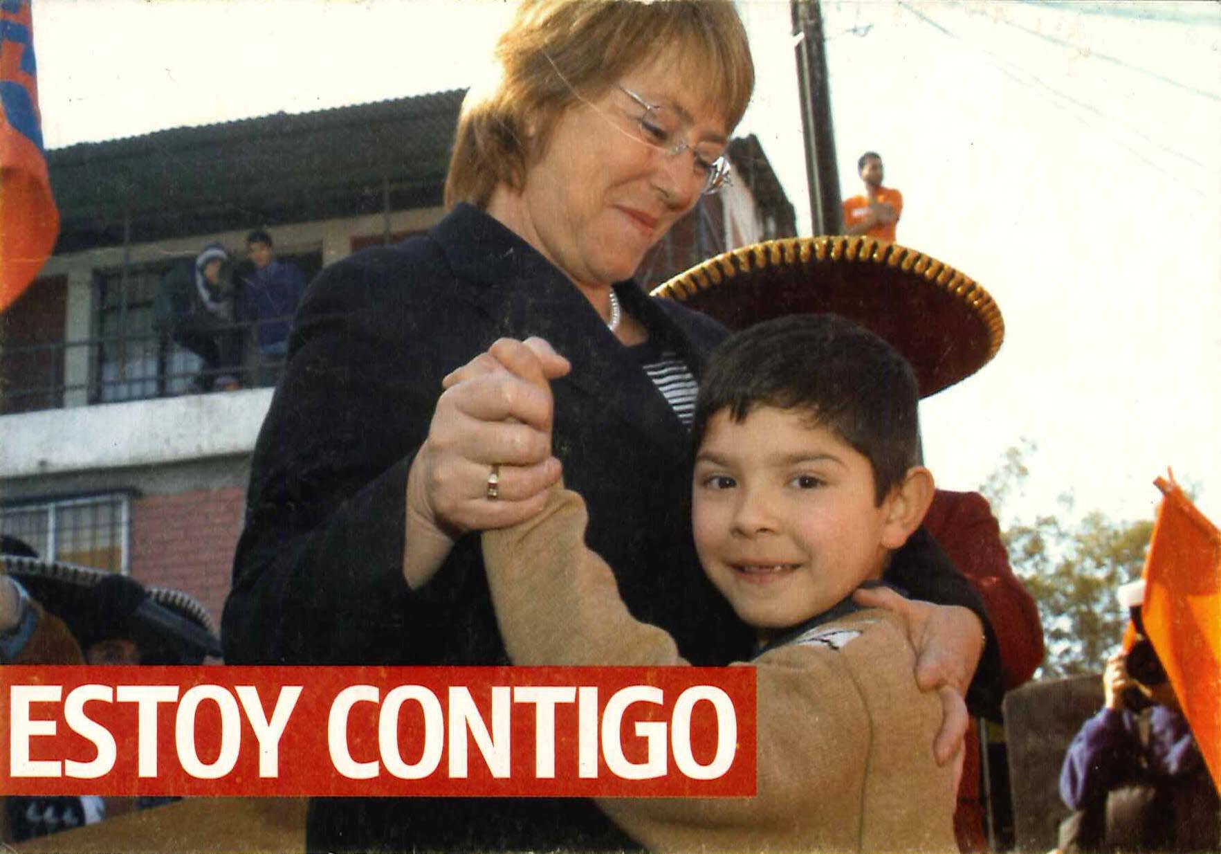 Propaganda de Michelle Bachelet, candidata en 2005 a Presidenta de Chile. En la imagen aparentemente bailando junto a un niño, que mira a la cámara. Una leyenda en un recuadro rojo dice: "Estoy contigo".